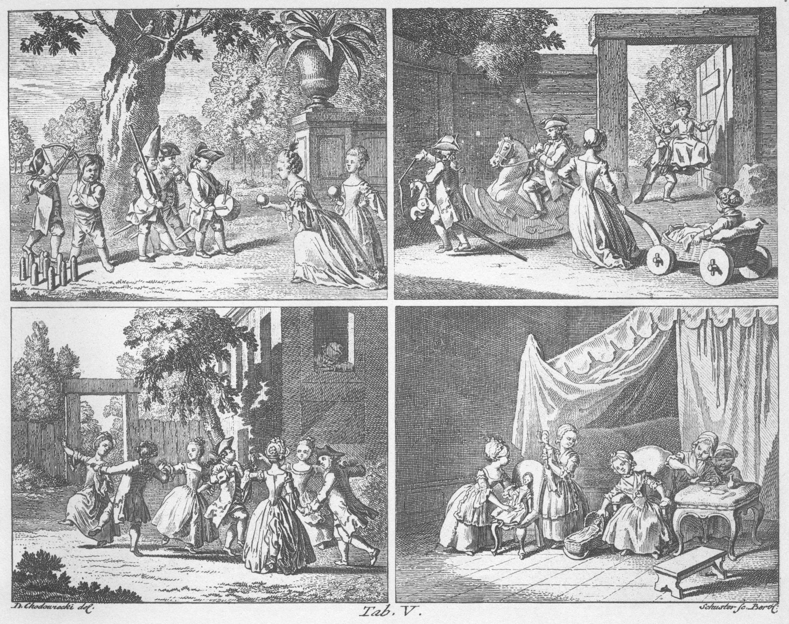 Tab. V. Vergnügungen der Kinder. (Beschreibung lt. Quelle)